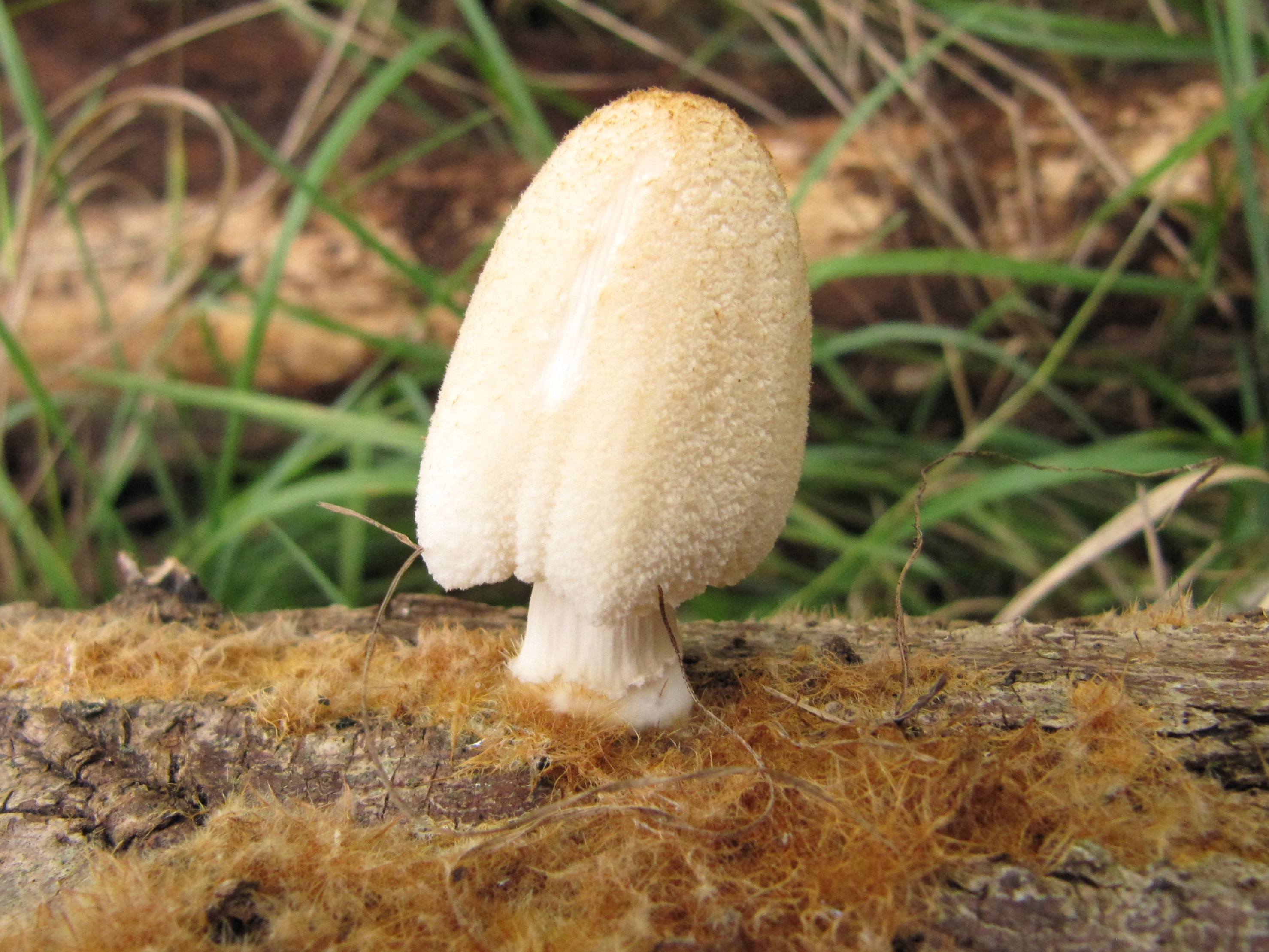 Falscher Holz-Tintling (Coprinellus ellisii)